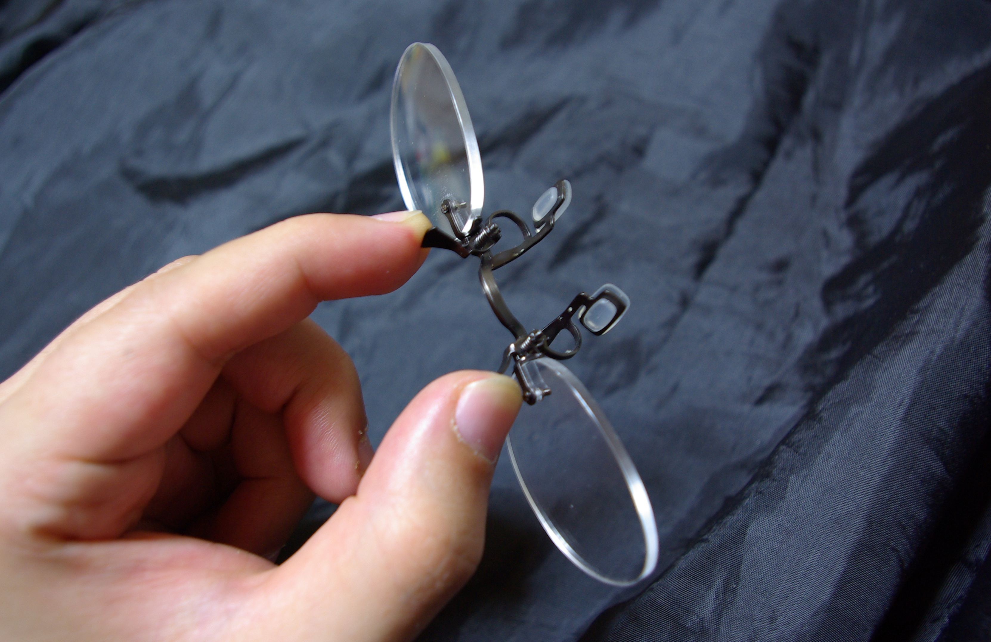 日本人向けに製作された、パッドが長めの鼻眼鏡(フィンチ)